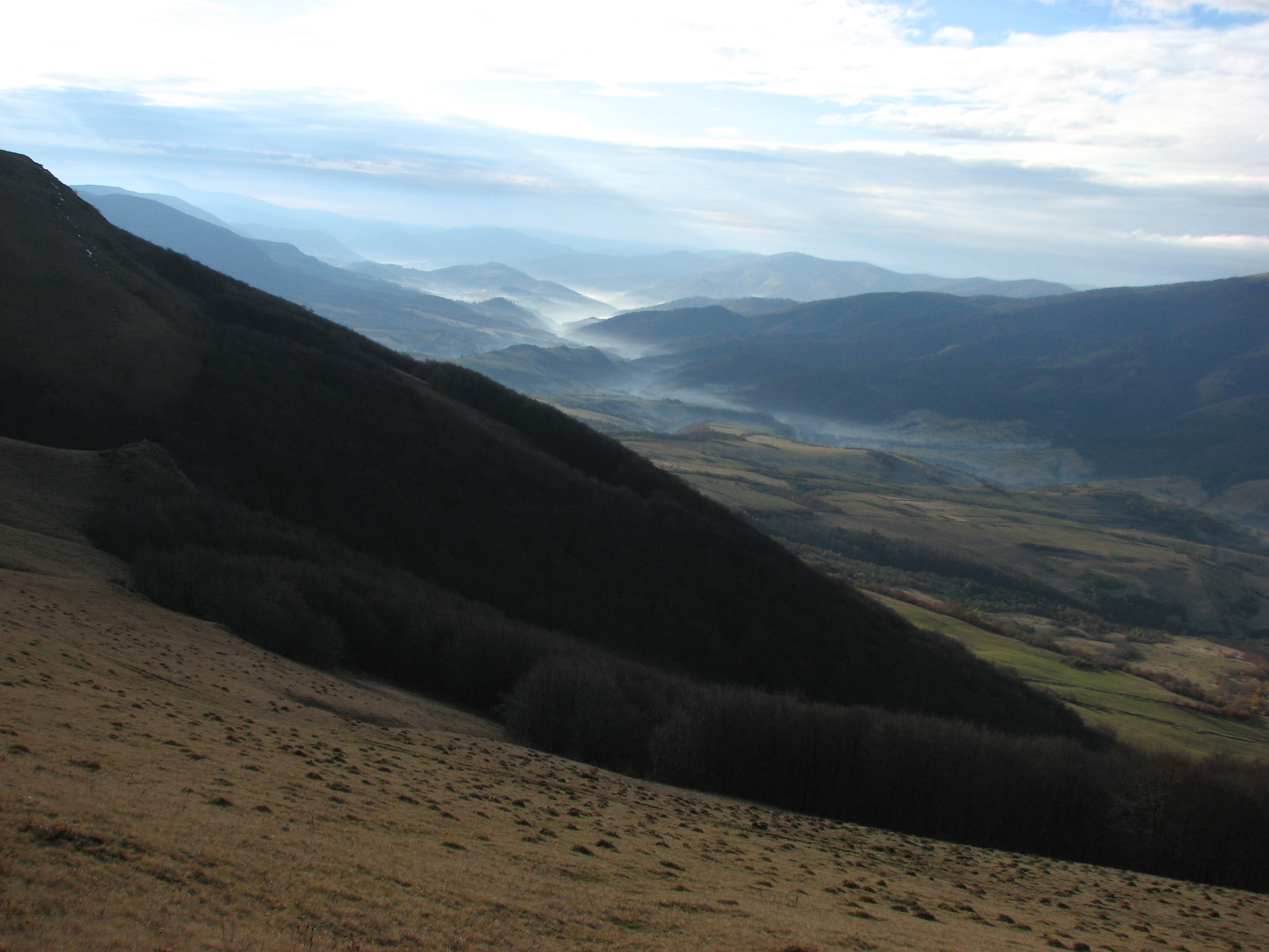 Верховинский Вододельный хребет